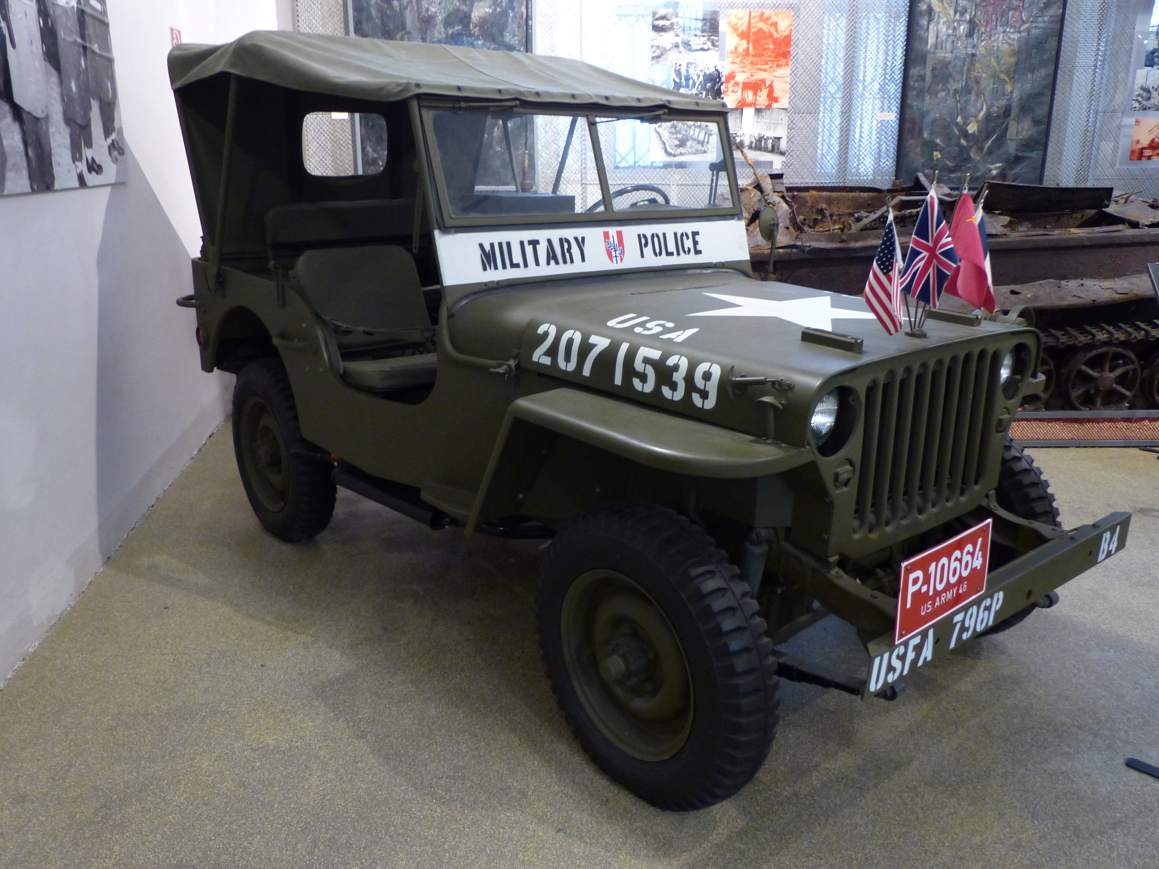 Jeep Willys MB mit dem die vier Besatzungsmächte in Wien in der Nachkriegszeit Kontrollfahrten unternahmen.